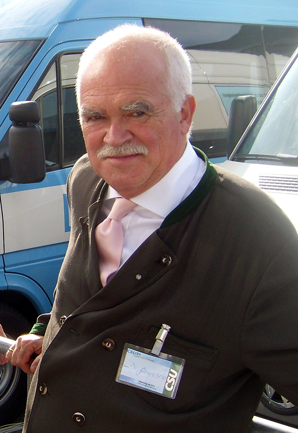 Peter Gauweiler auf dem CSU Parteitag in Nürnberg 2009